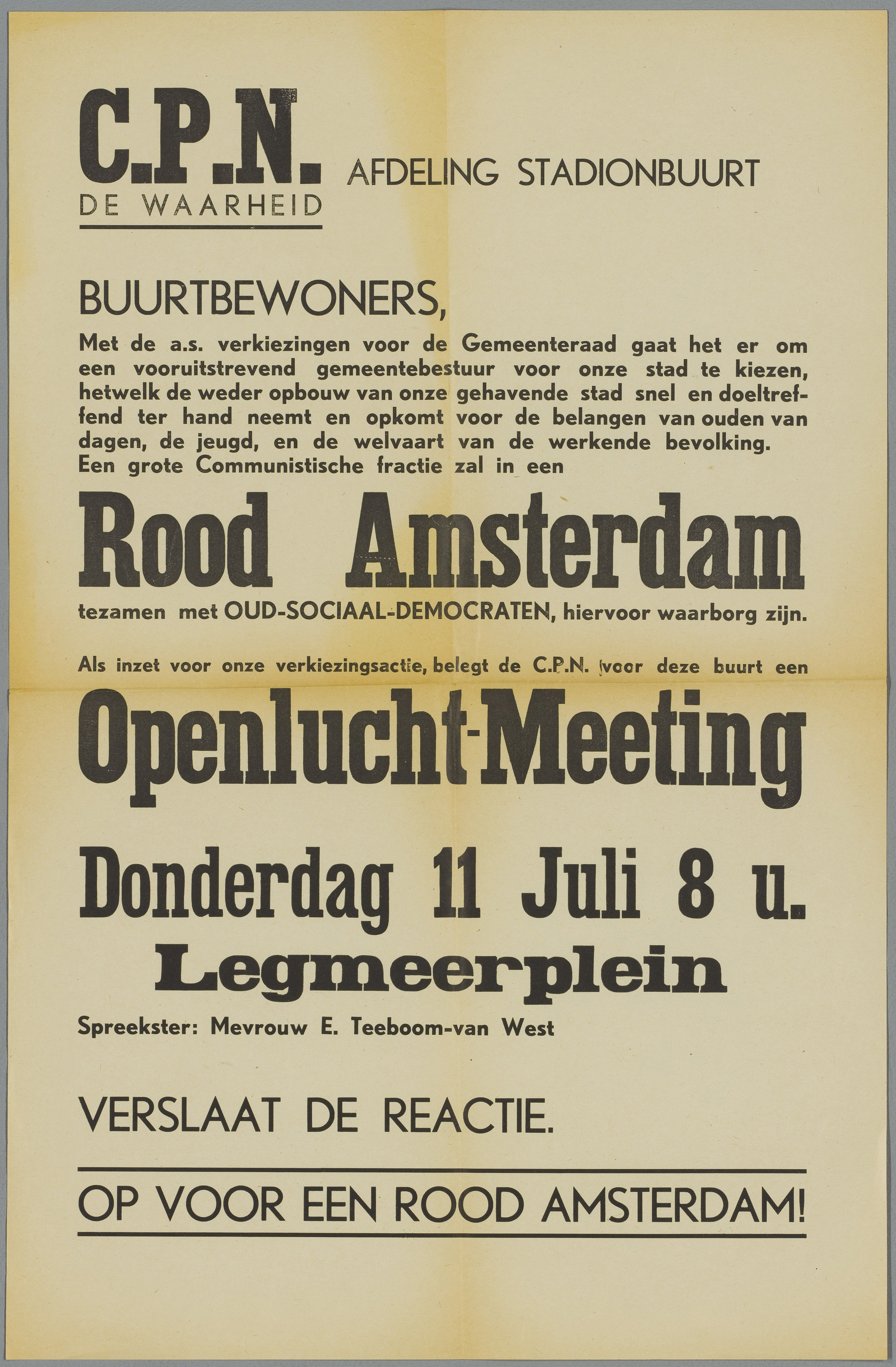 Verkiezingsaffiche van de C.P.N.-De Waarheid, afdeling Stadionbuurt, met aankondiging van een openluchtmeeting voor buurtbewoners op het Legmeerplein op donderdag 11 juli. Spreekster: mevrouw E. Teeboom-Van West.